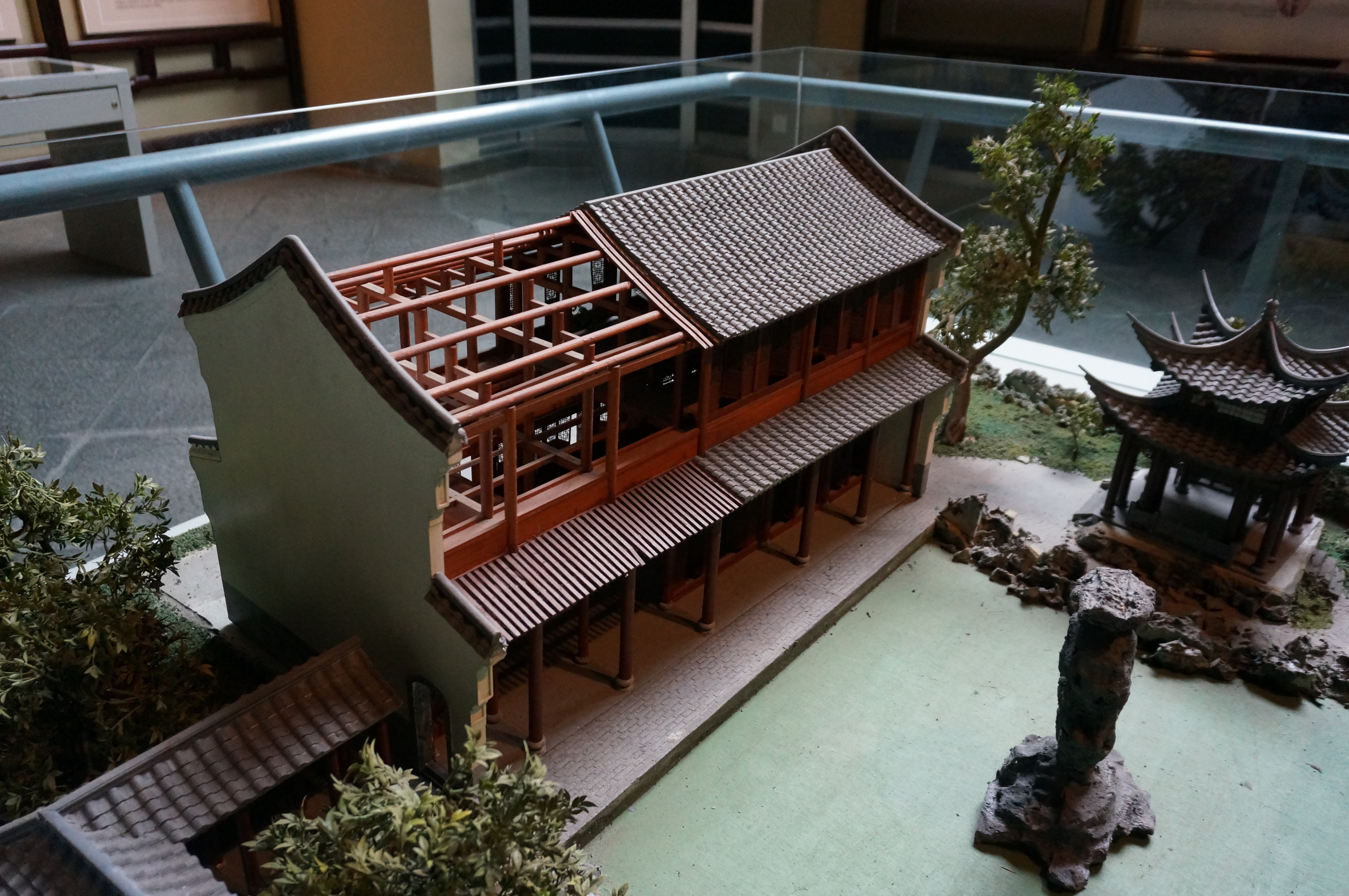 文澜阁后院模型（自西向东看），西湖博物馆藏。